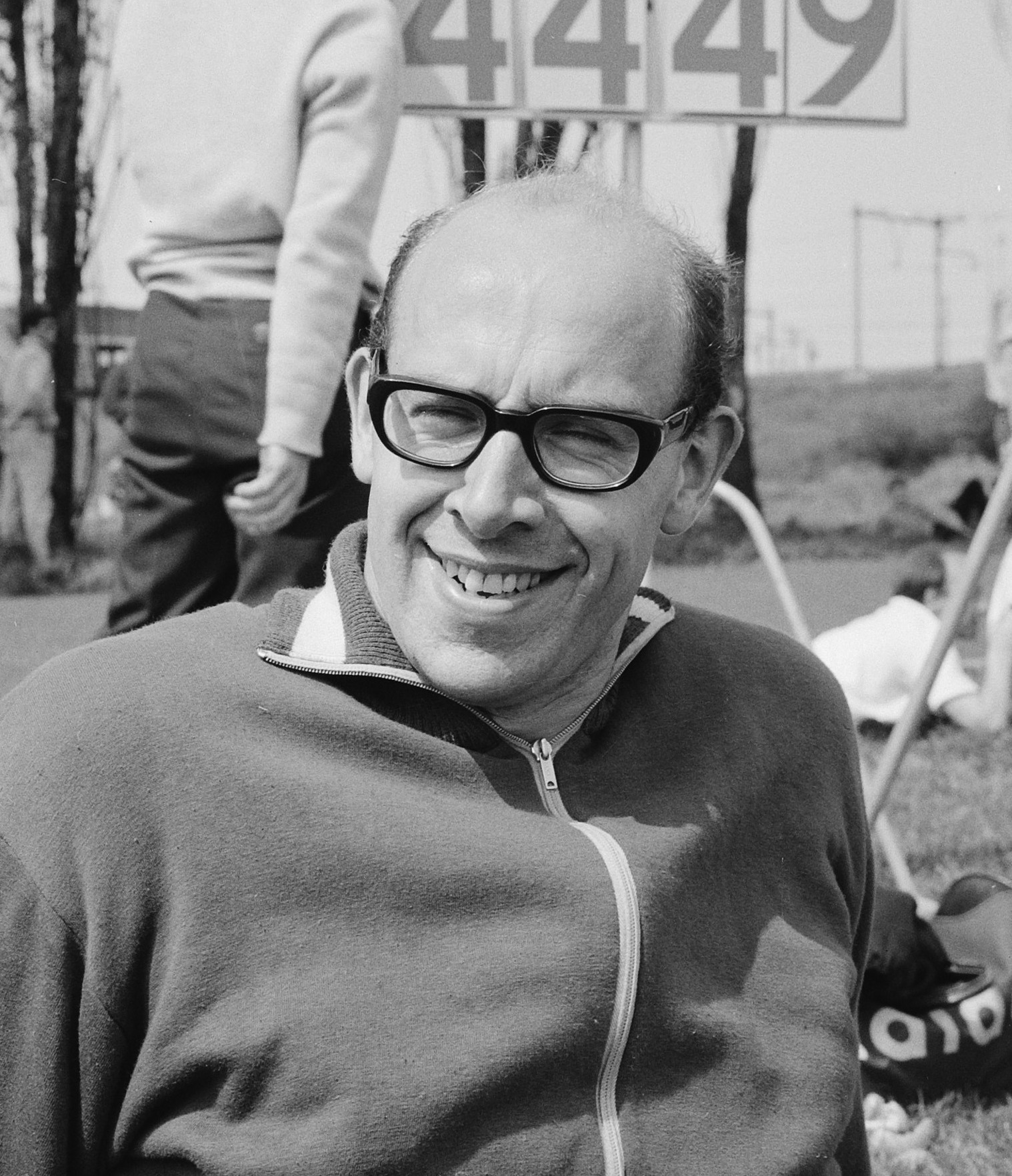 Internationale atletiekwedstrijden, Cees Koch (kop)